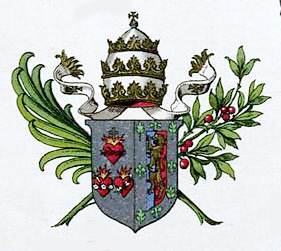 Hugo Gerhard Ströhl: "Heraldischer Atlas". Stuttgart 1899. Tafel 49, Kirchliche Heraldik, Bild 5, Wappen Giuseppe Sebastiano Neto, Patriarch und Erzbischof zu Lissabon